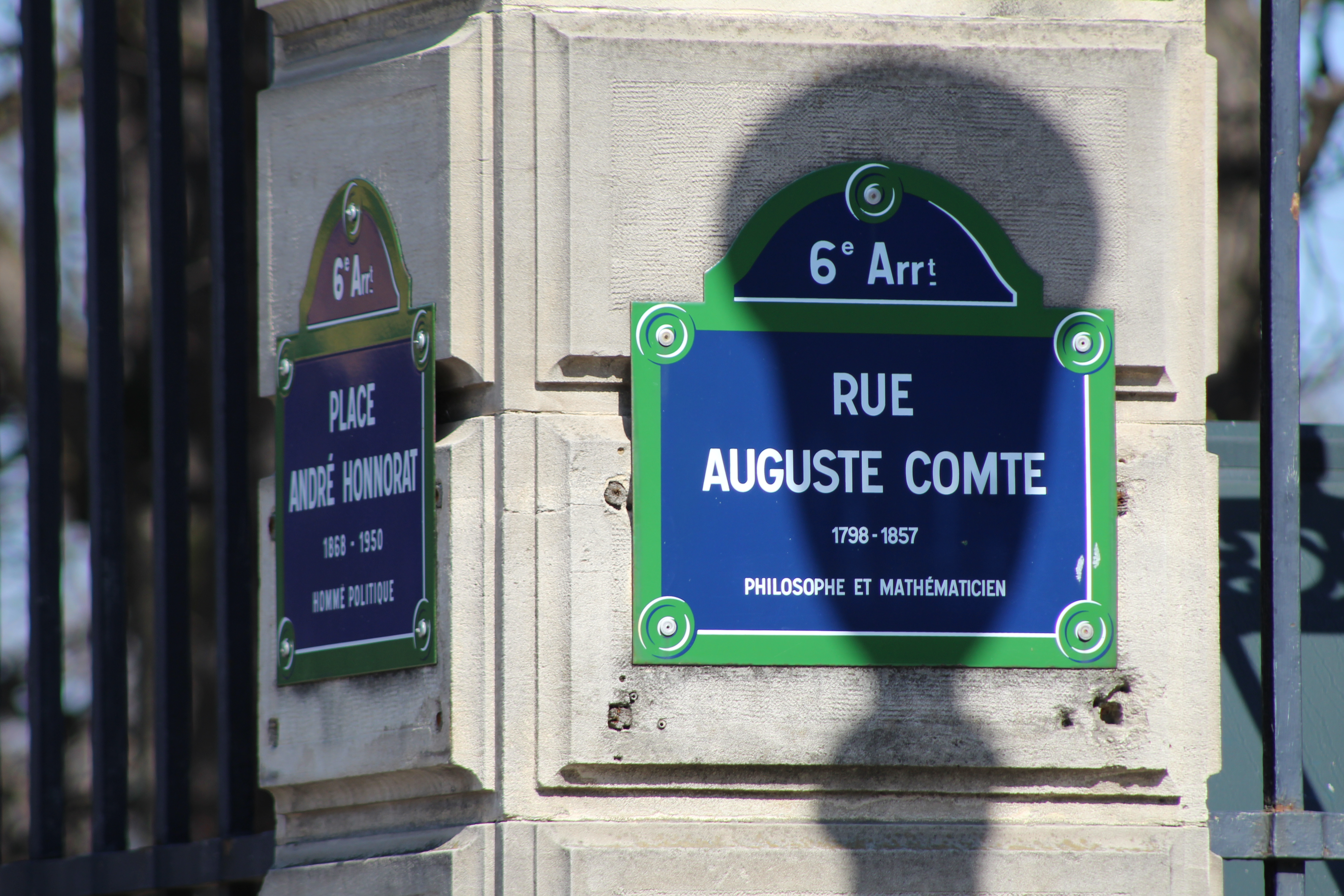 Plaque de la rue Auguste Comte à Paris, à l'entrée du jardin du Luxembourg, Paris.